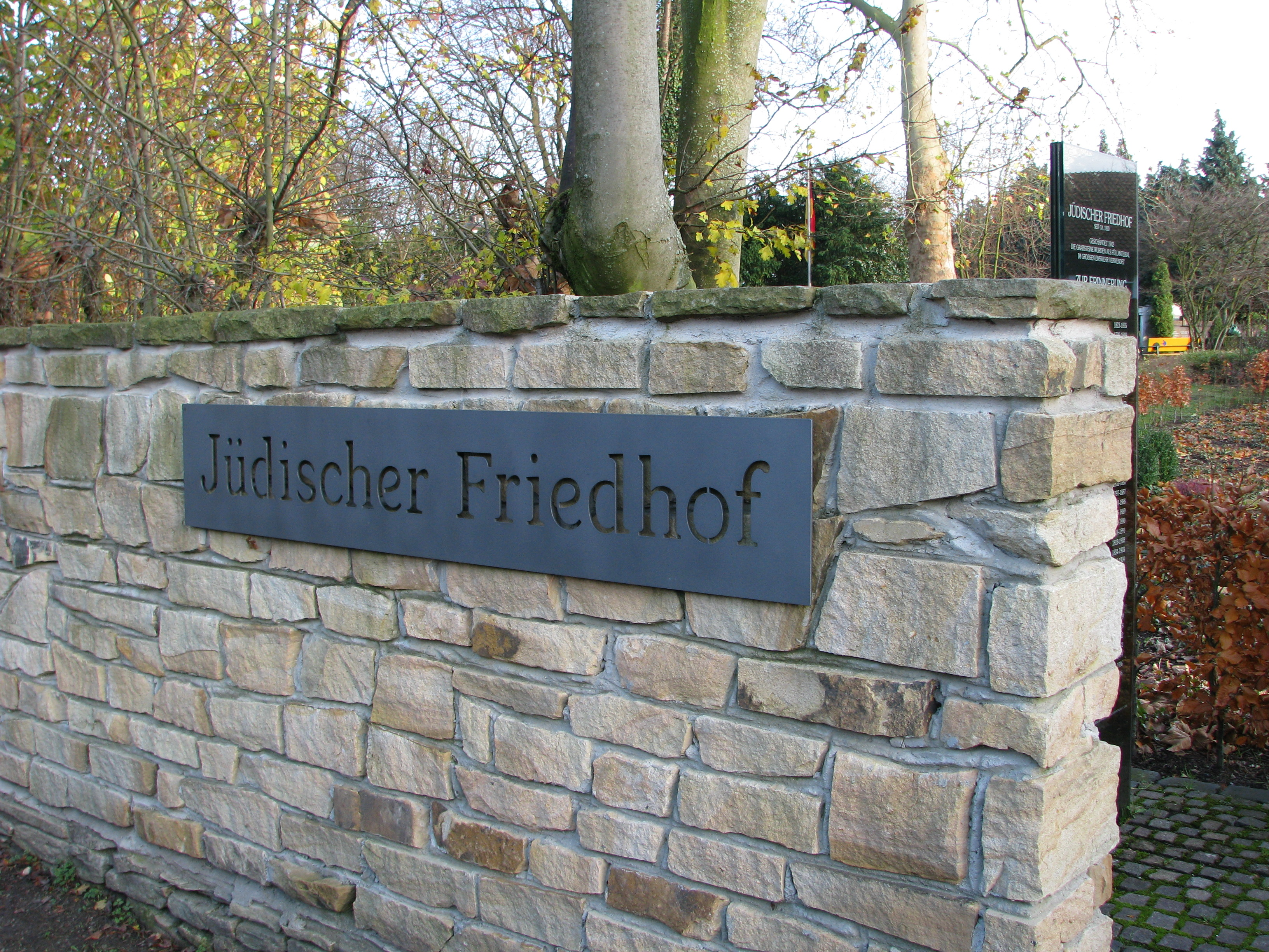 Mauer am Jüdischen Friedhof Telgte.